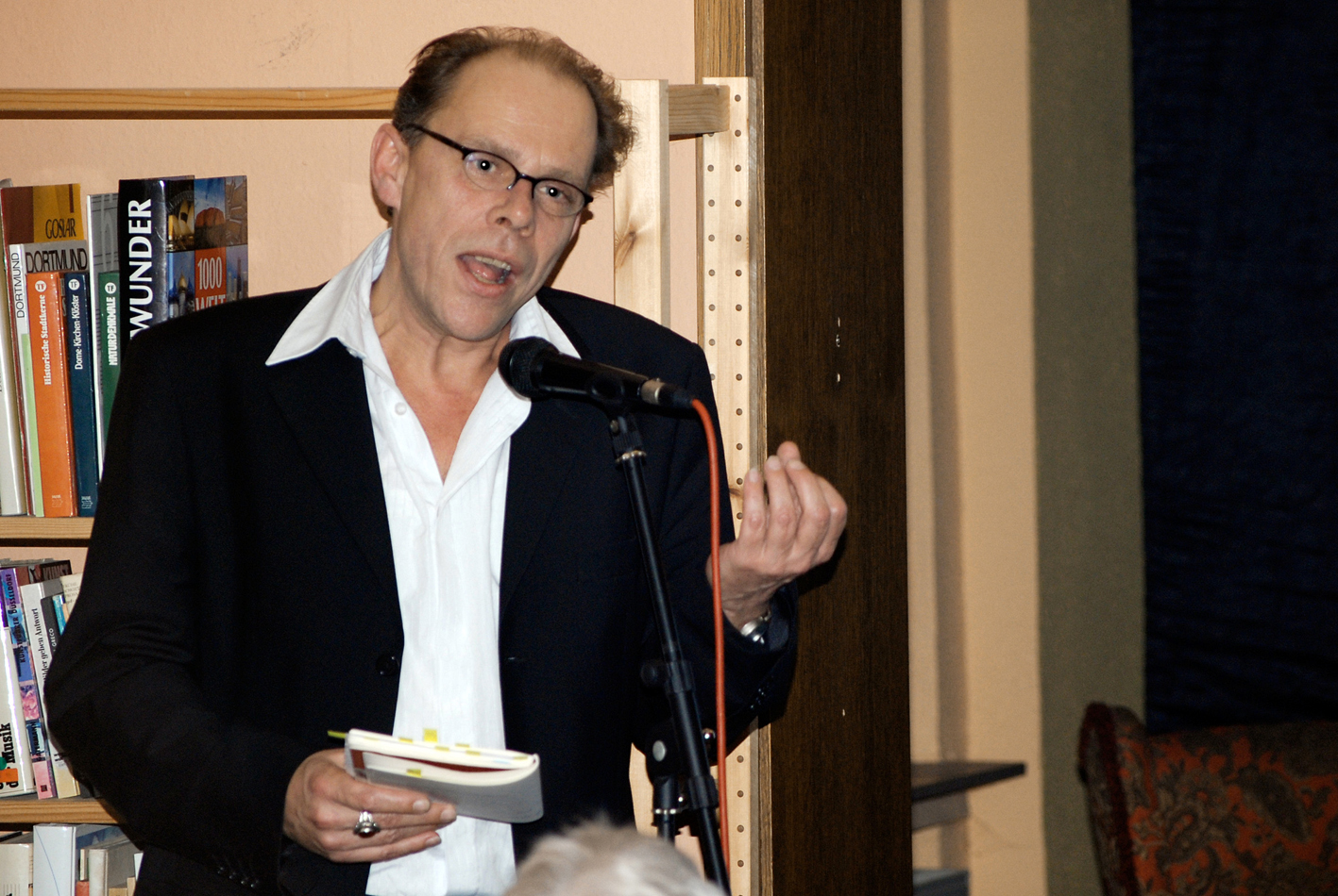 Frank Starik Lesung beim LesArt-Festival im Taranta Babu in Dortmund am 11. November 2010, Foto von Hartmut Salmen